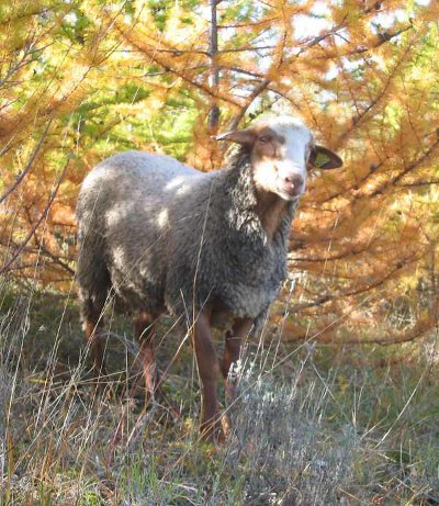 Jeune Bélier Mourerous ( 2 ans ) dans les mélèzes au col de Miscon